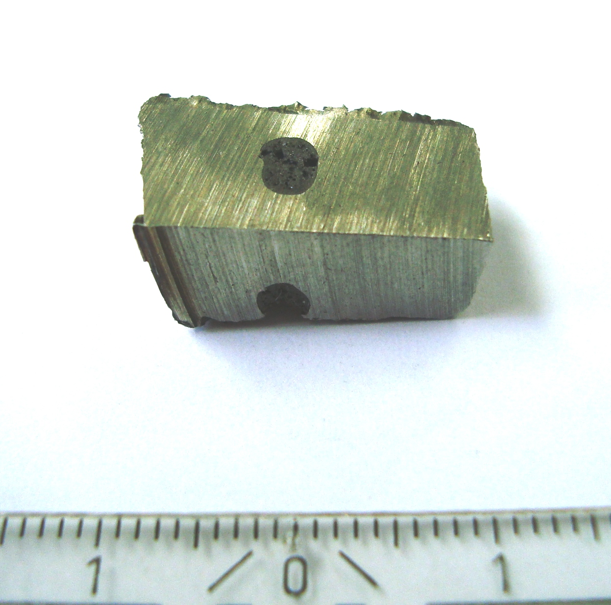 Einschluss in metallischer Grundmasse